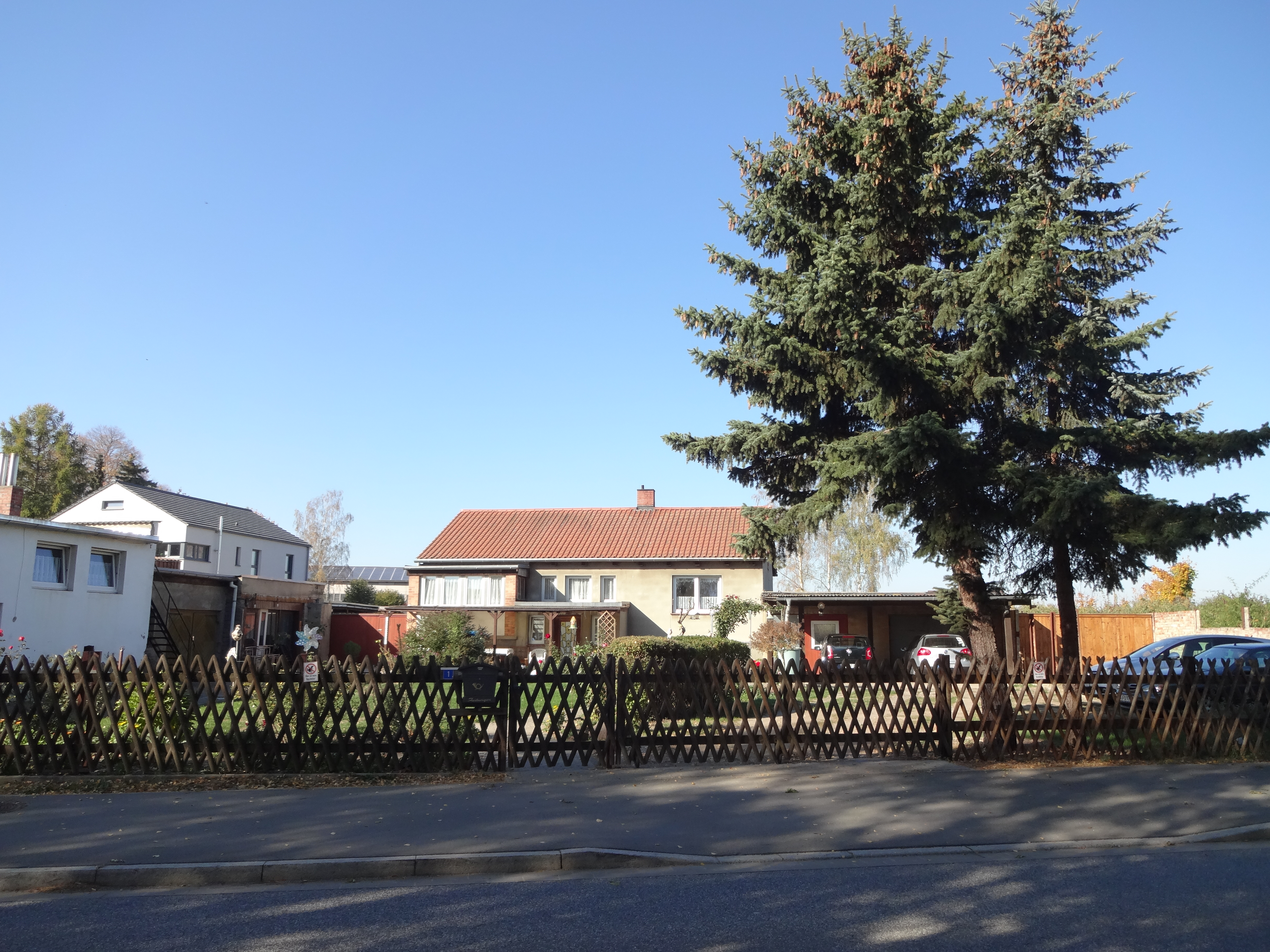 ehemals denkmalgeschütztes Zollhaus in der Dardesheimer Straße 1 in Zilly